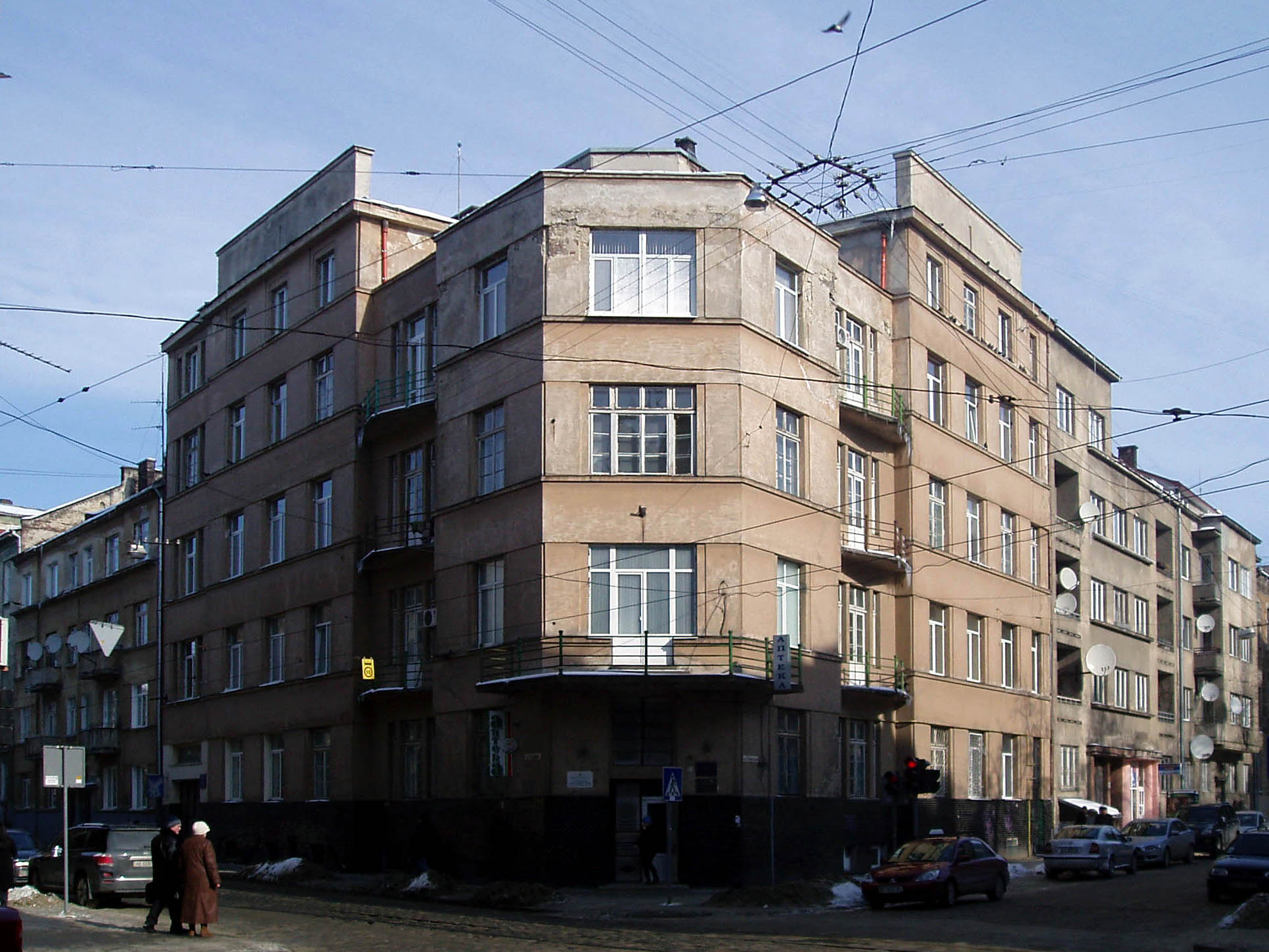 "Дім емігранта" на вулиці Коновальця, 12. Архітектор Генрик Заремба (1883 - після 1939).